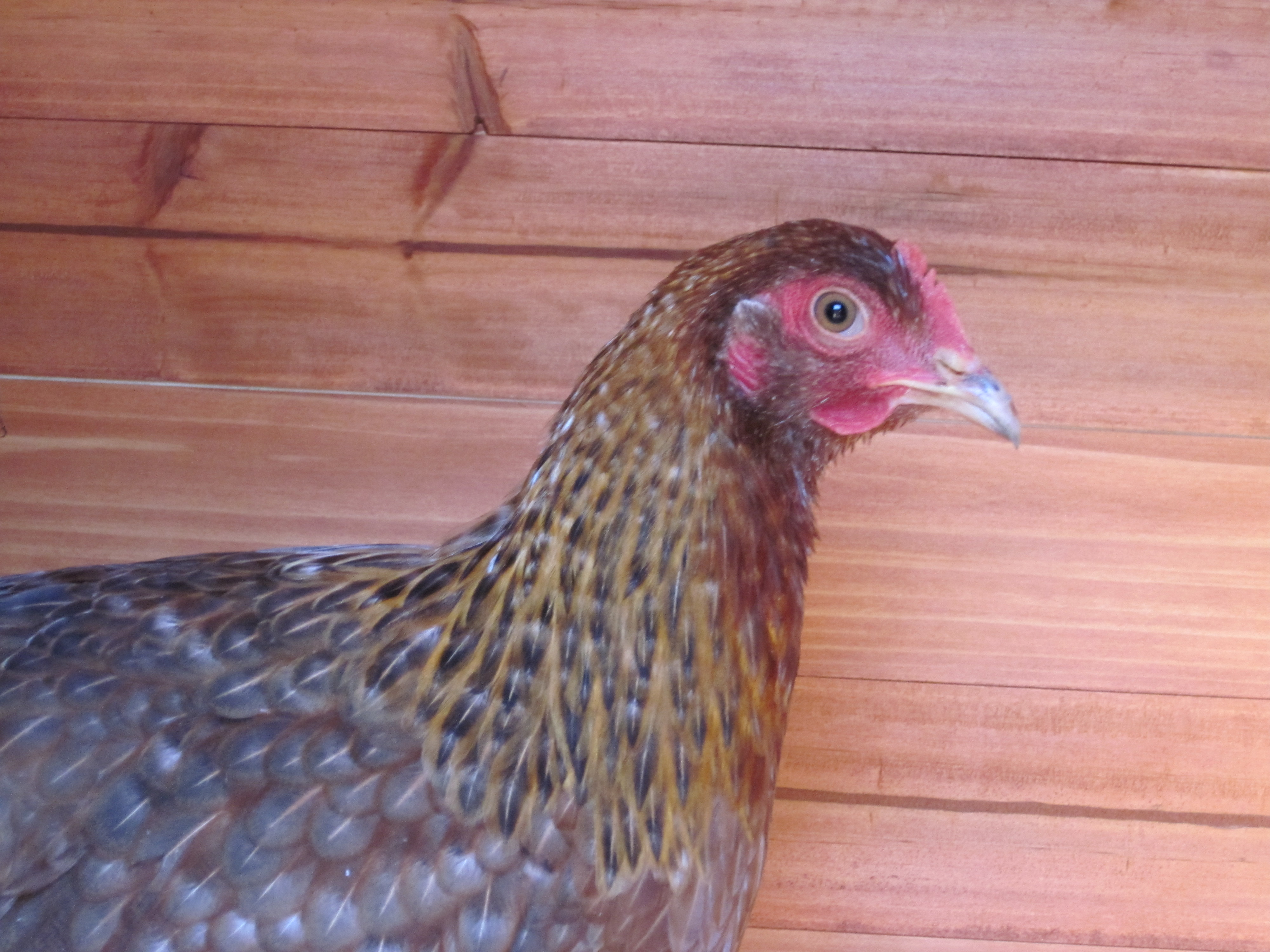 Poule de Bielefeld (Bielefelder)